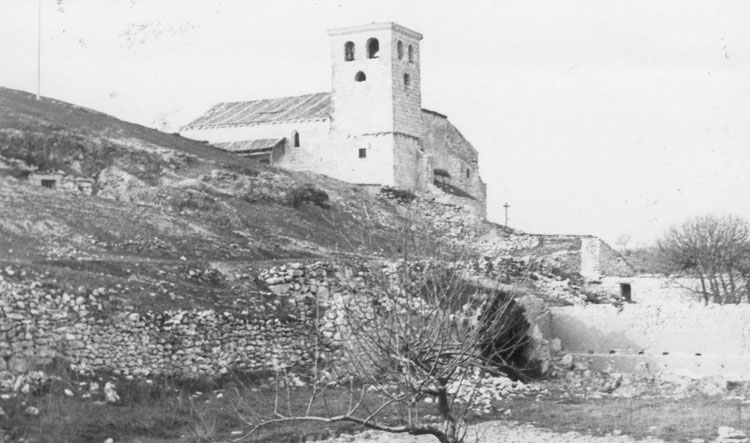 Iglesia - Fompedraza (Valladolid) - Álbum 200 x 140 - Fotografía. Papel 115 x 70 B/N